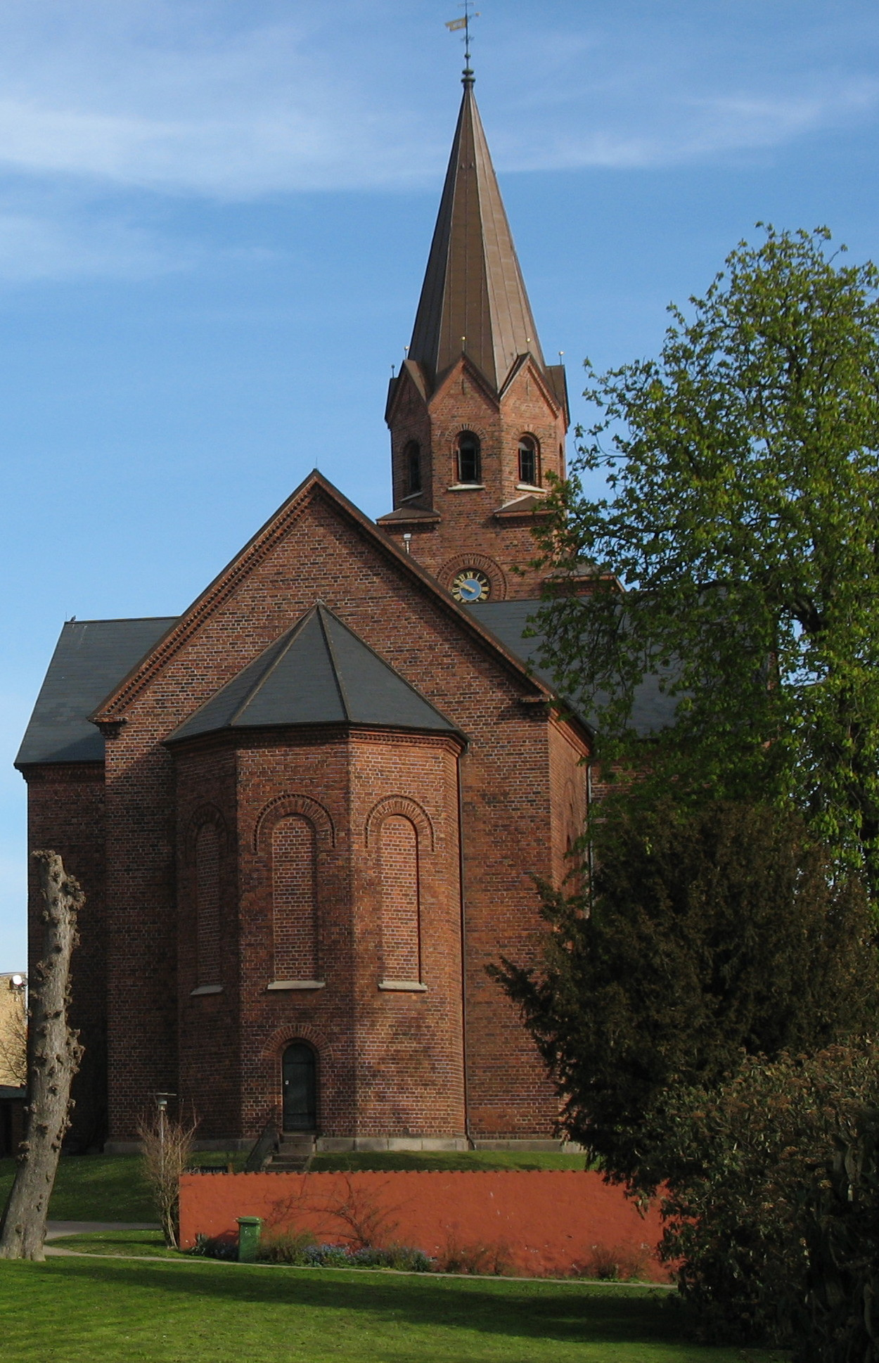 Skt. Nikolaj Kirke - Holbæk